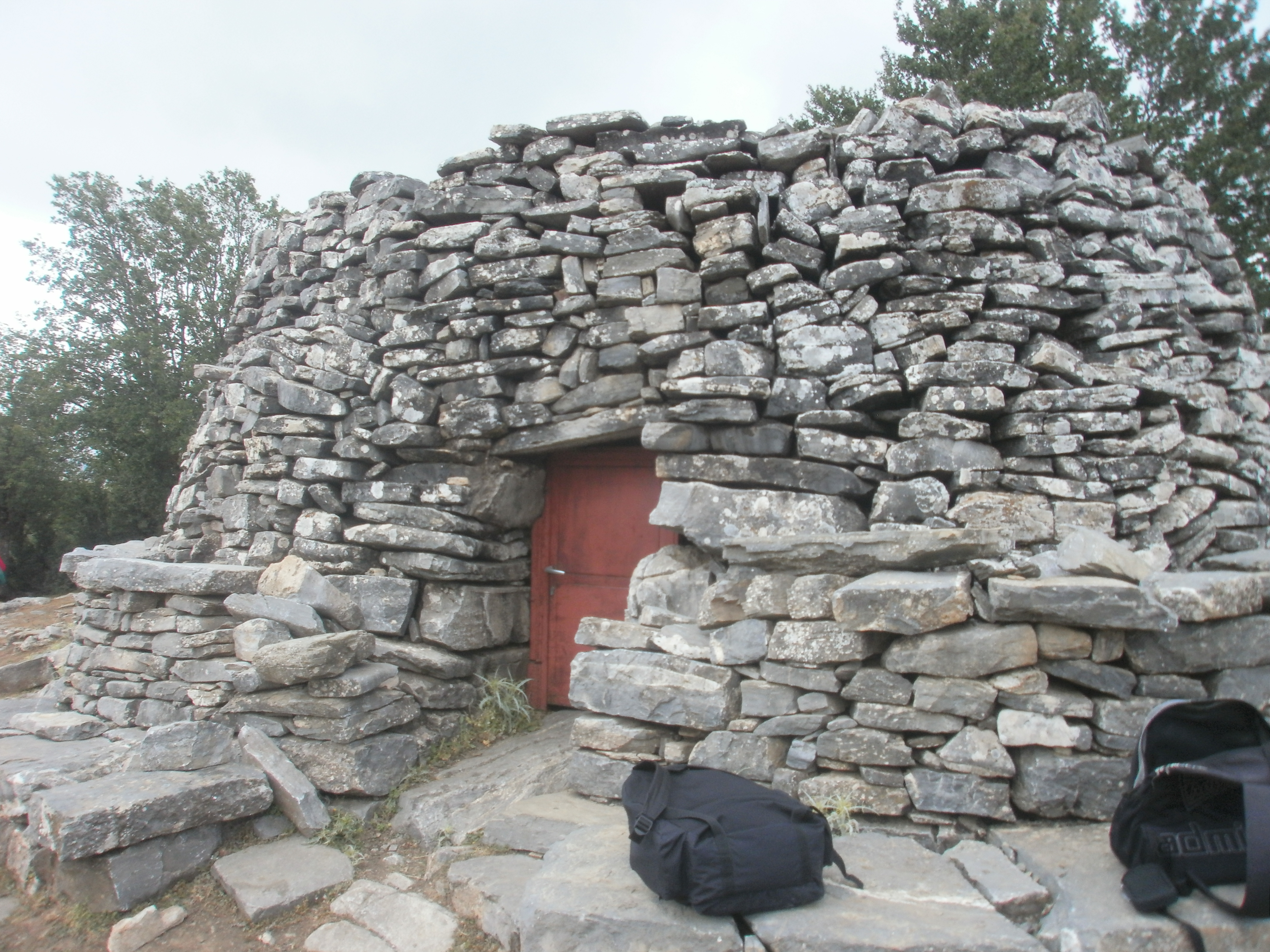 Μιτάτος στον Ψηλορείτη Κρήτης, στο Ρέθυμνο